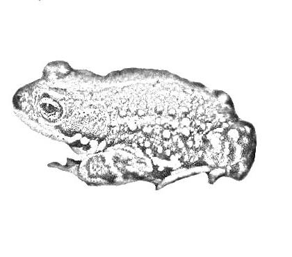 Sapo de Rulo